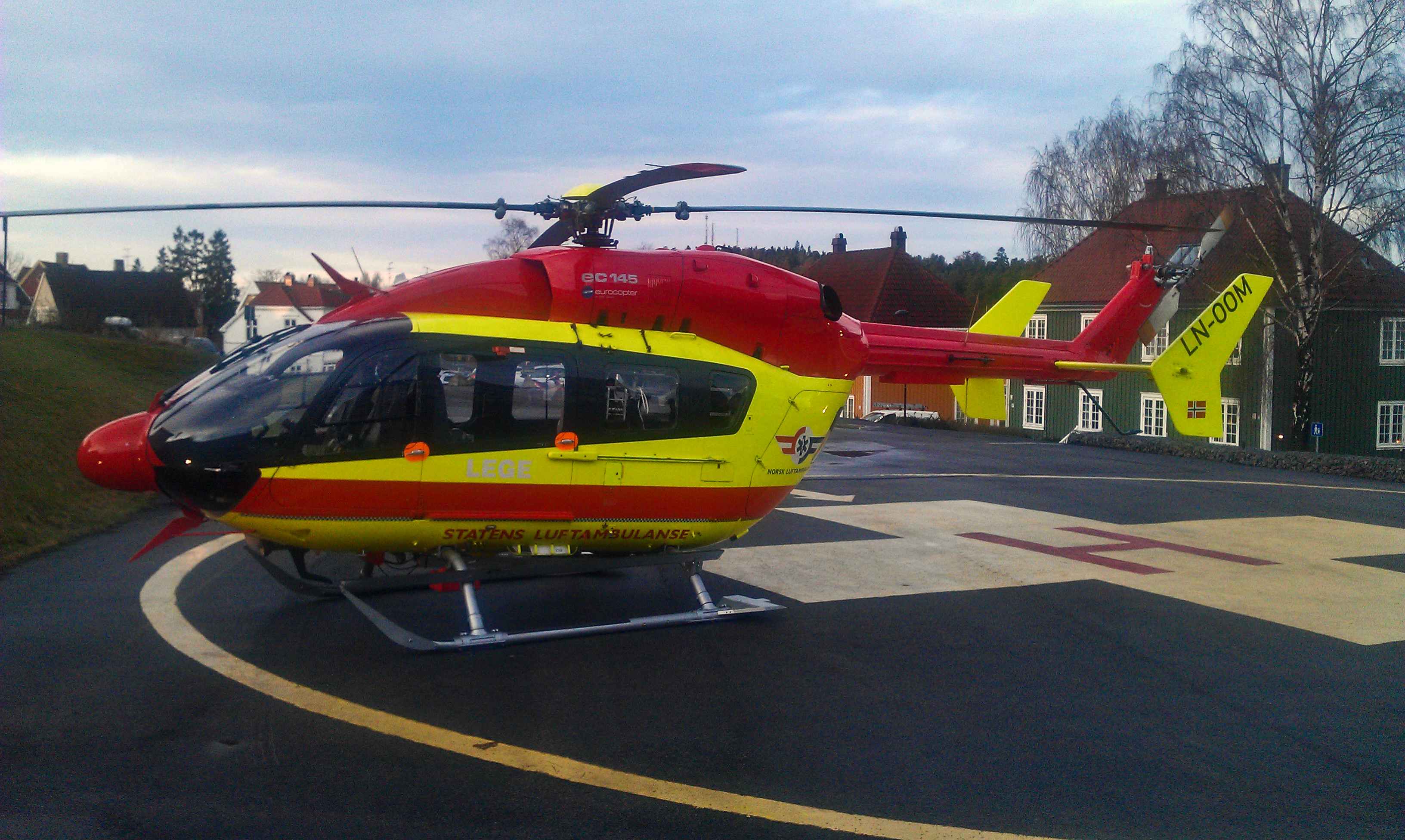 Norsk luftambulanse LN-OOM ved Sykehuset i Vestfold, Tønsberg.